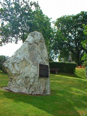 Der geographische Mittelpunkt Deutschlands.